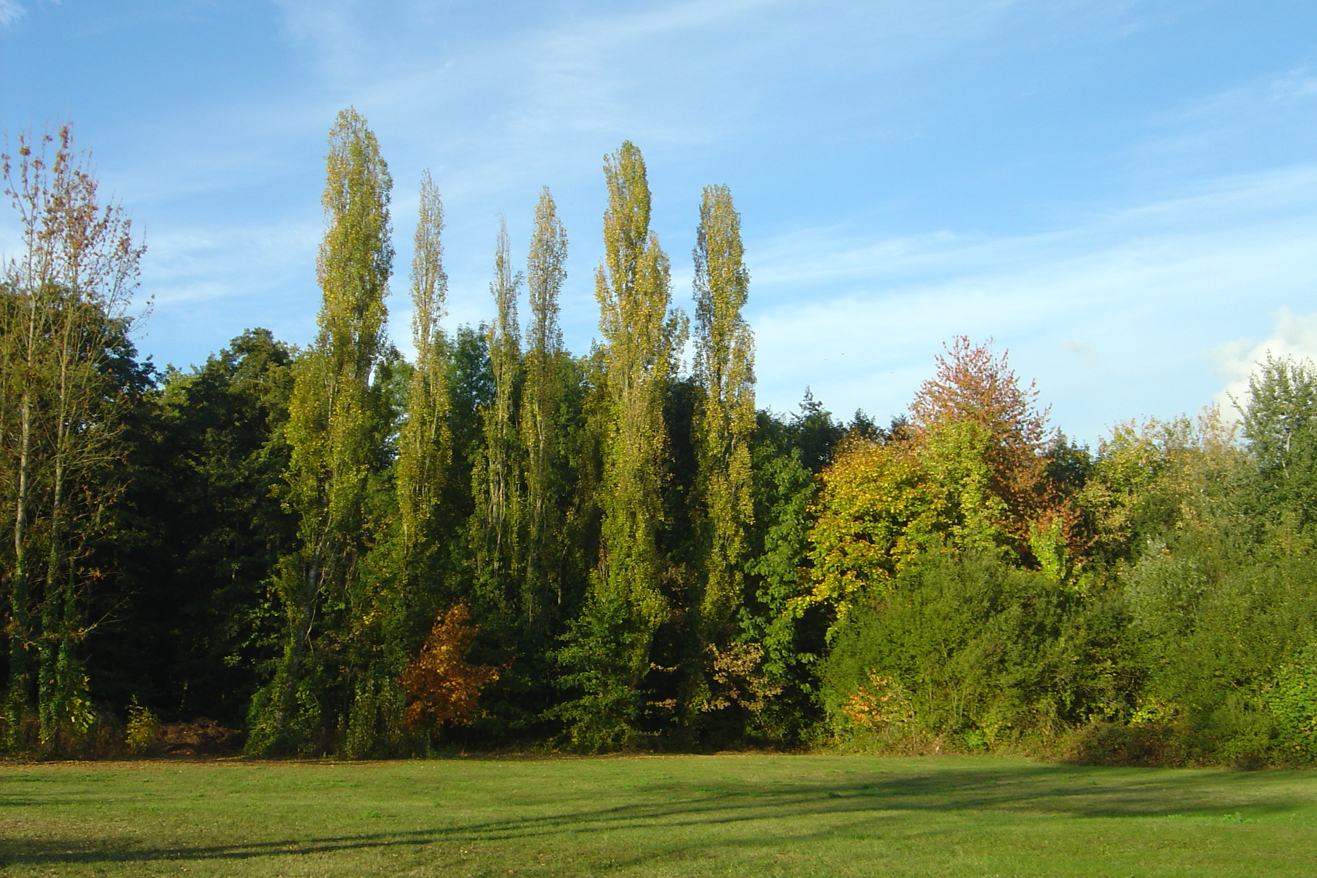 Université Paris-Sud (Orsay)